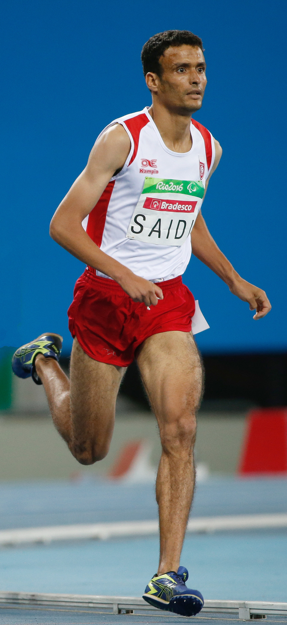 Rio de Janeiro - Prova dos 1500m T38 do atletismo nos Jogos Paralímpicos Rio 2016, vencida pelo tunisiano Abbes Saidi, no Estádio Olímpico.